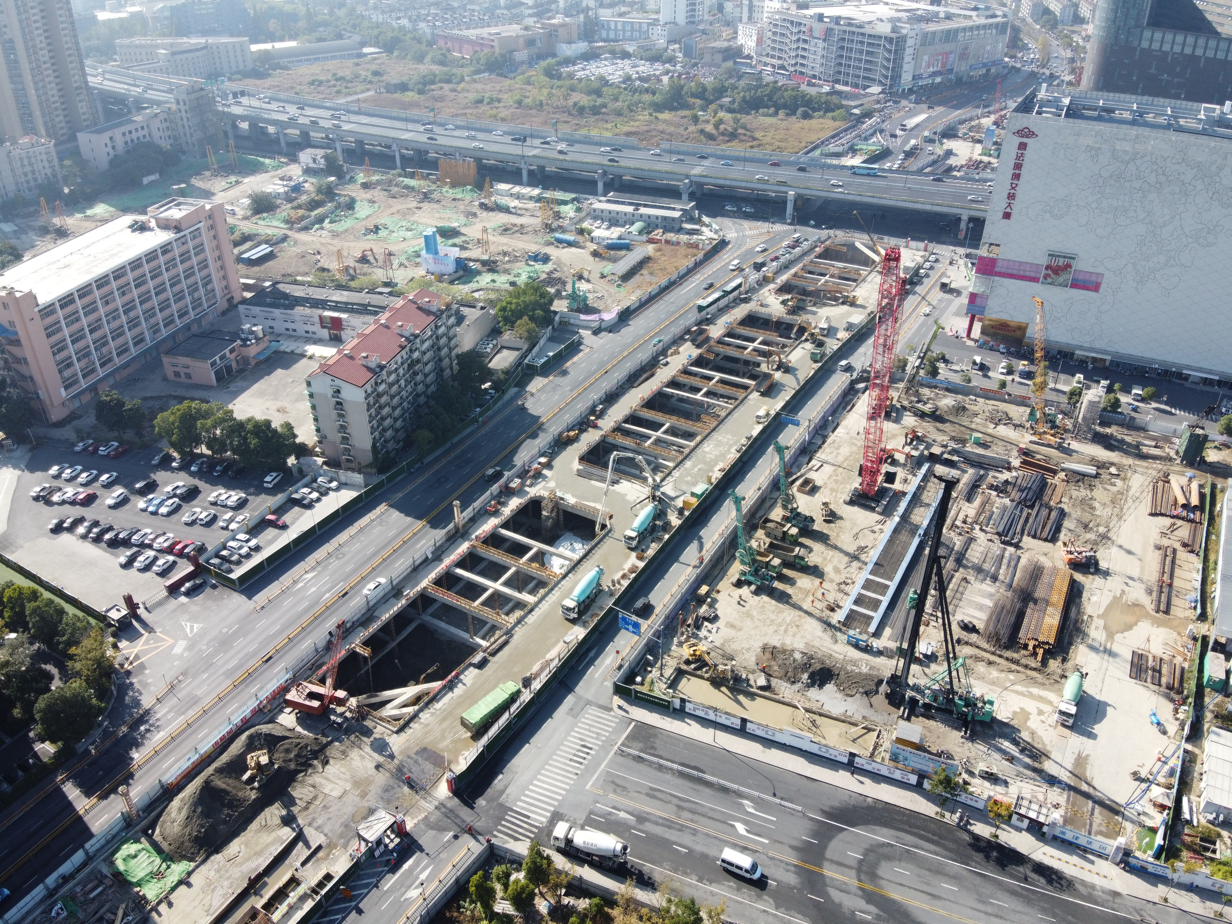 20191115四季青站工地